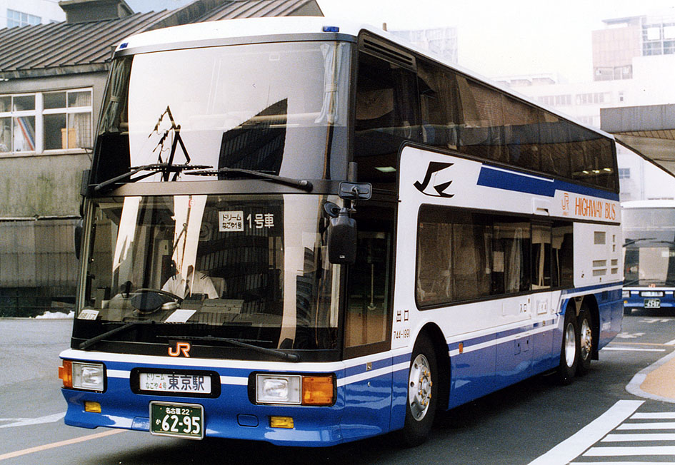 JR東海バス ドリームなごや号 三菱ふそう エアロキング U-MU525TA改 744-1991